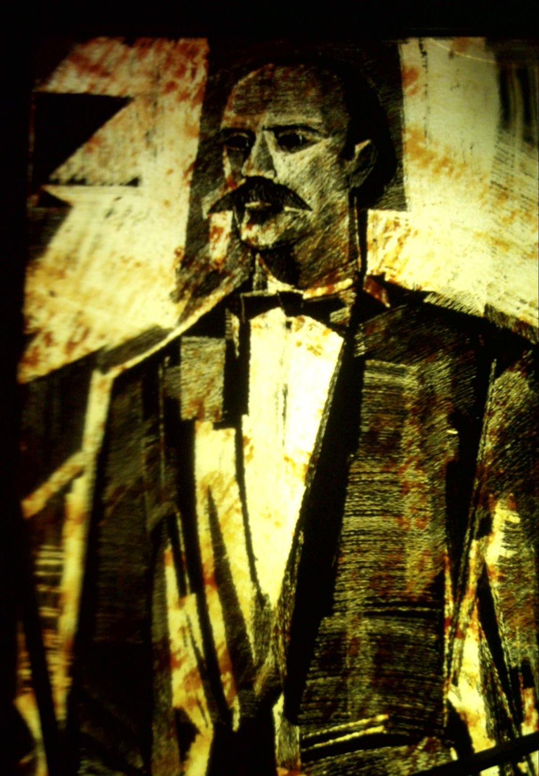 Calixa Lavallée, détail d'un vitrail de Frédéric Back datant de 1967 à l'intérieur de la station de métro Place-des-Arts.